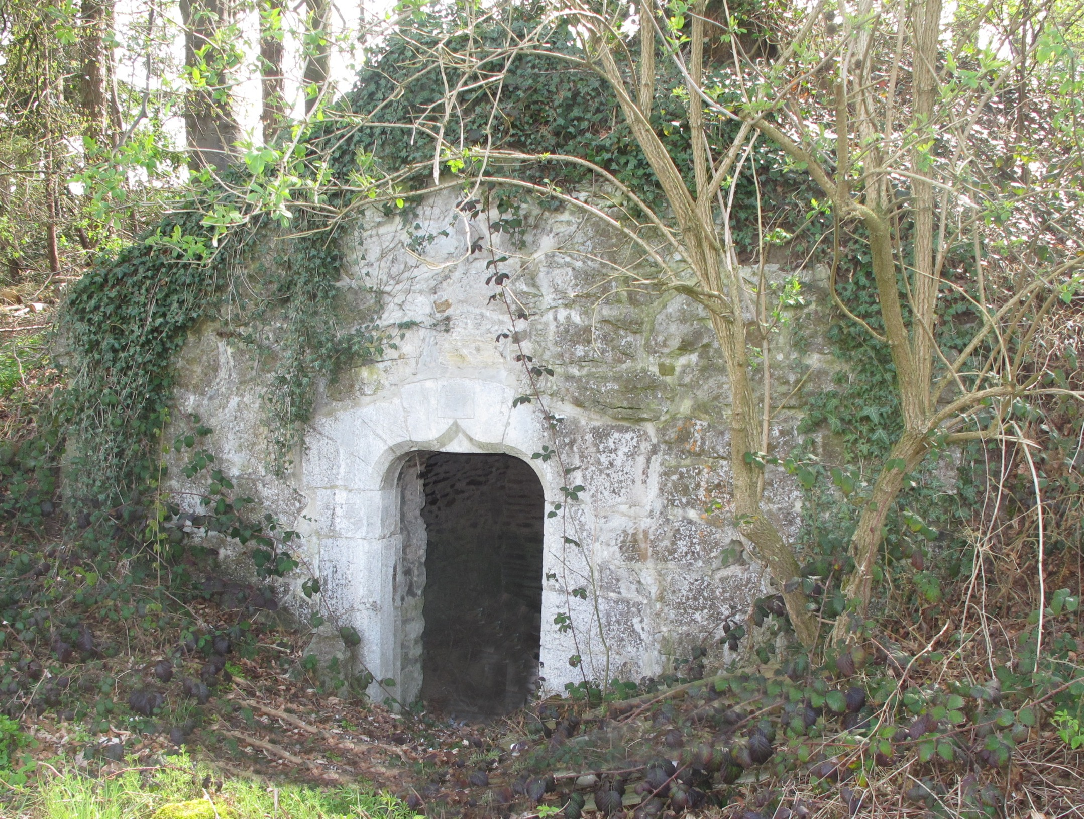 Eiskeller von Schloss Goé 1752 erbaut